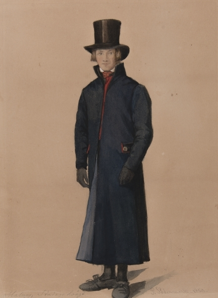 Man i söndagsdräkt. Akvarell av P Södermark Depicted place: Q10576235 (Q10576235)